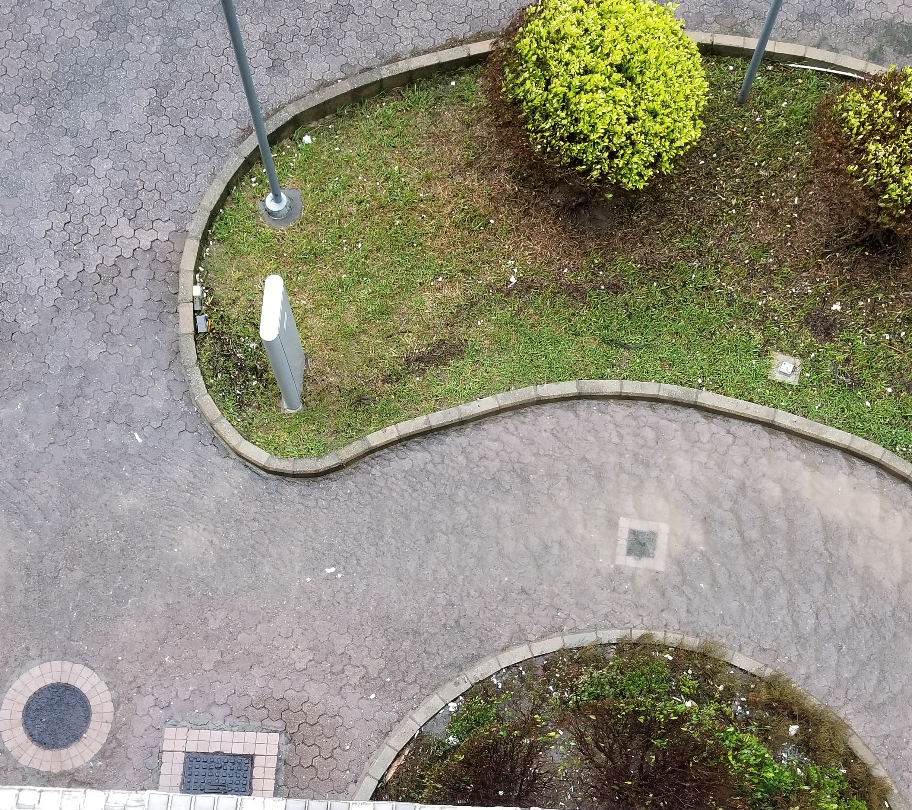 中文（香港）: 第二張相 cut